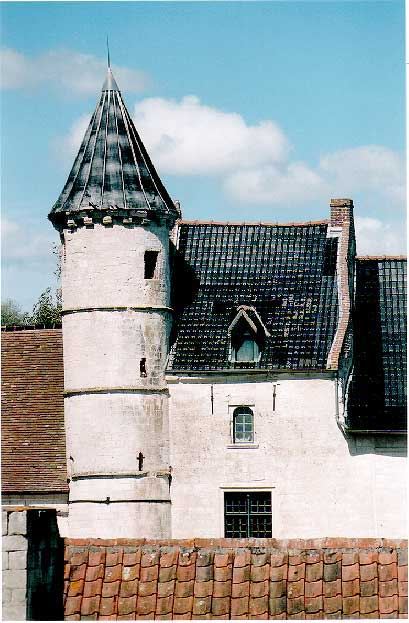 Le manoir de Capelle-Fermont